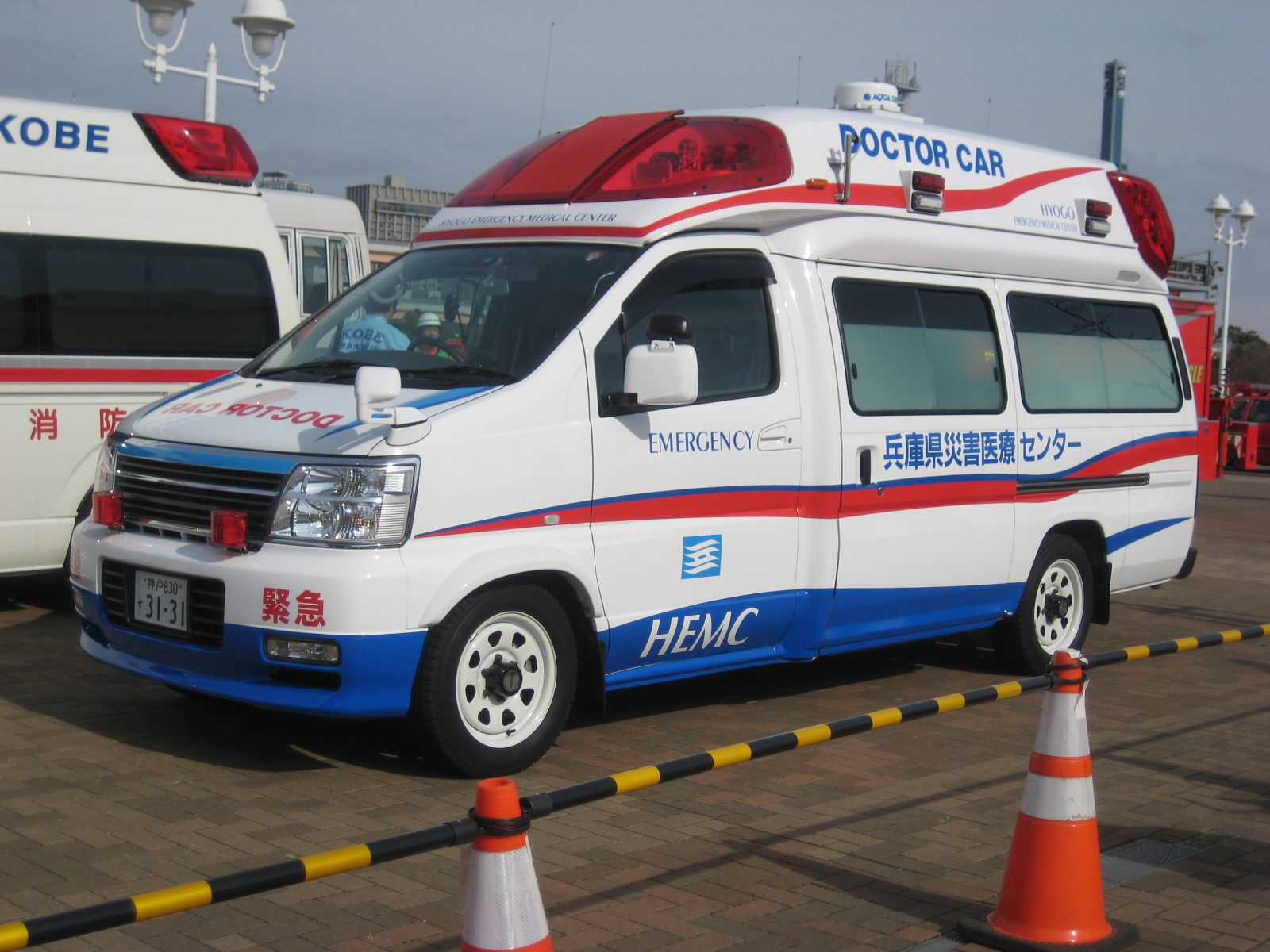 兵庫県災害医療センター2代目ドクターカー